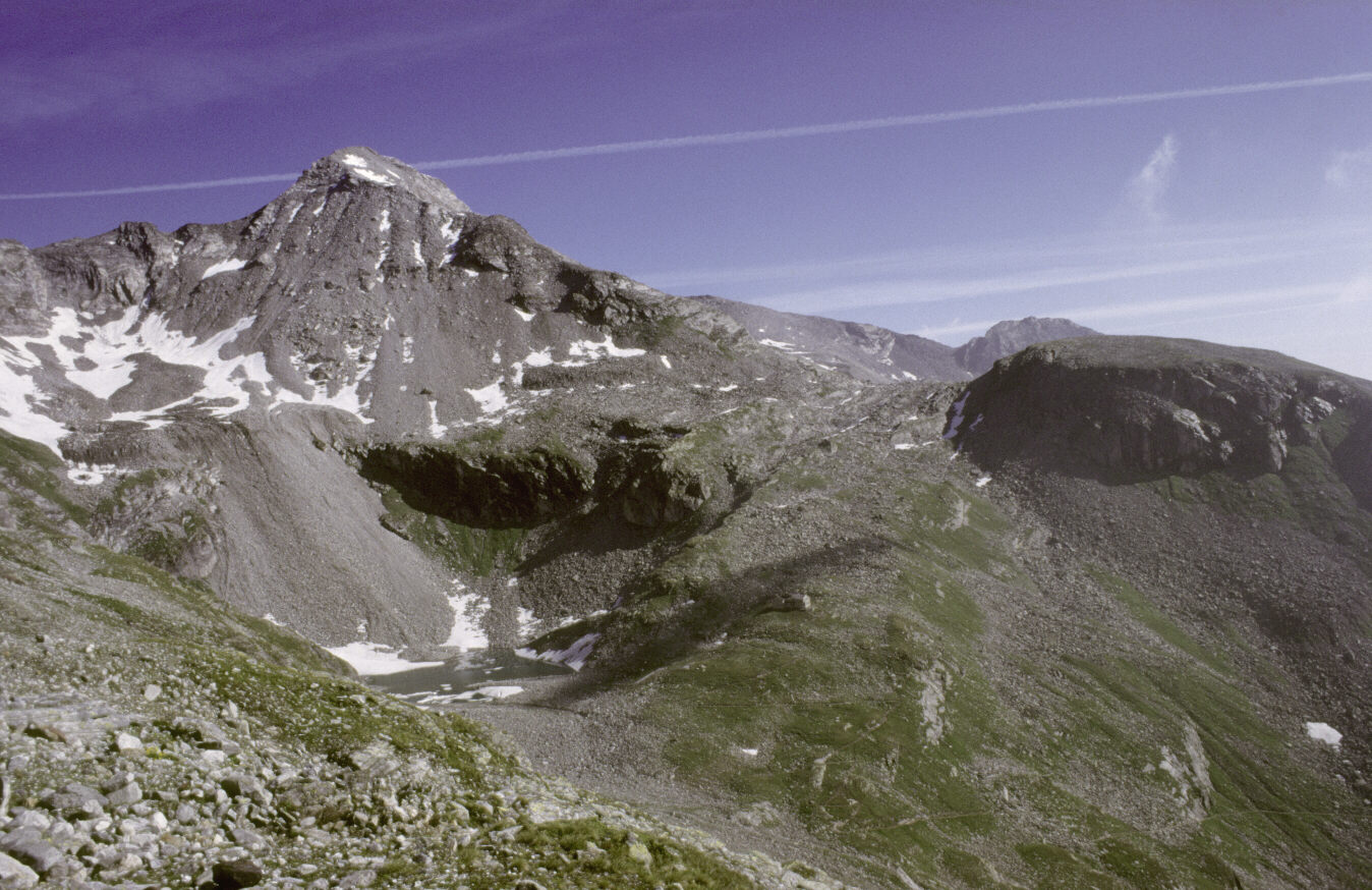 Hoher Riffler mit Friesenbergsee und Friesenberghaus, Zillertaler Alpen, Österreich